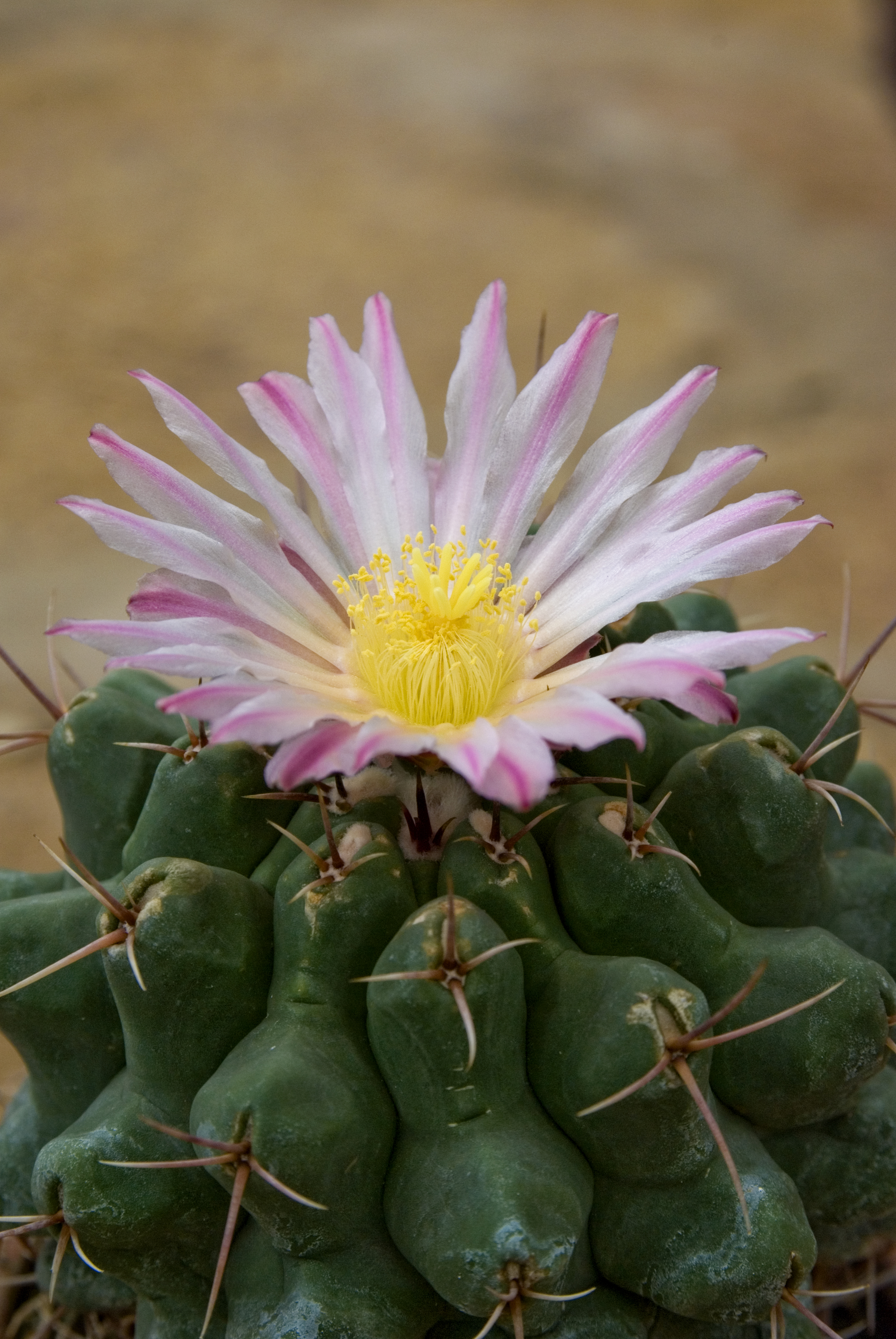 Floraison de Thelocactus hexaedrophorus dans les serres du Jardin botanique de Lyon